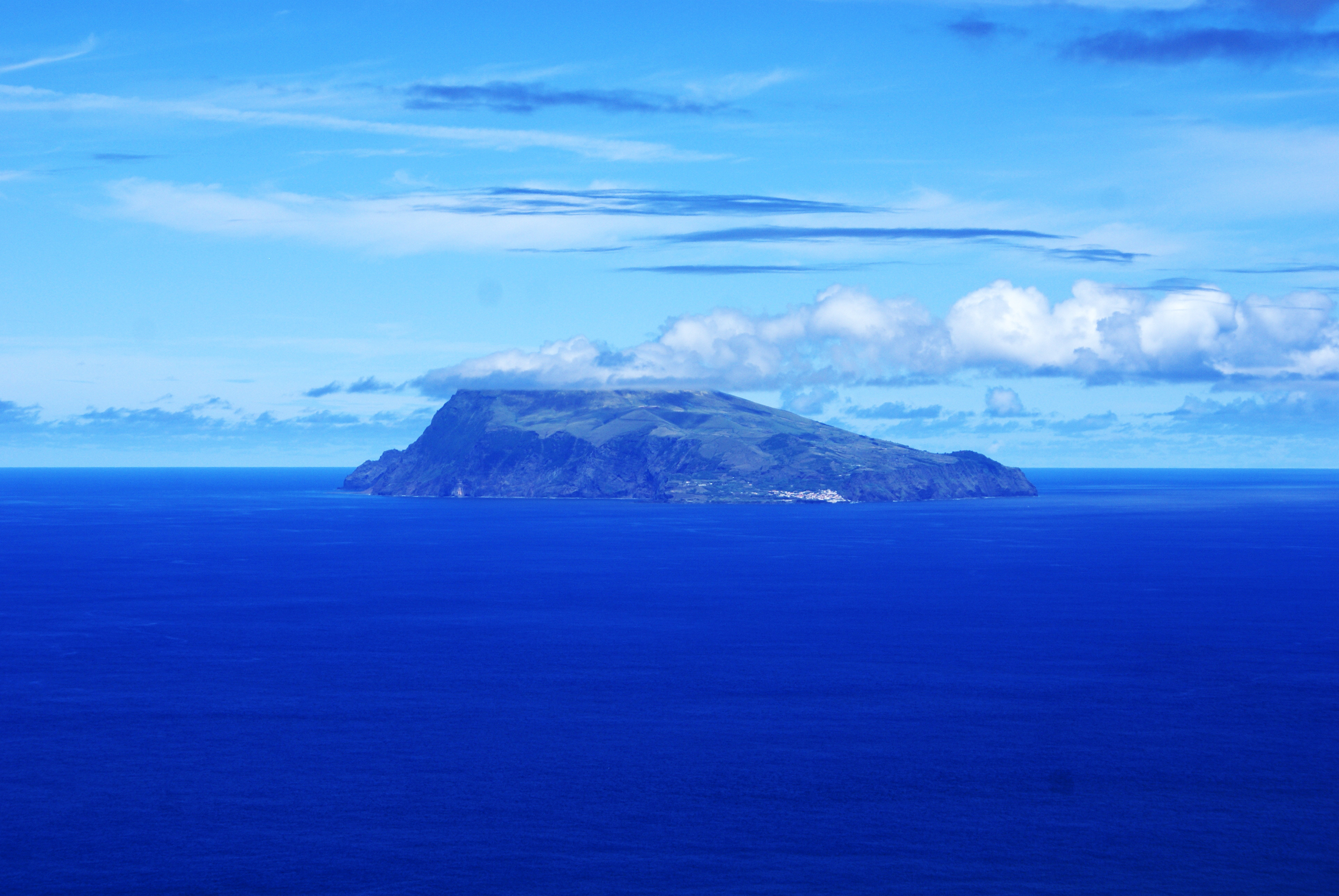 Chegada à ilha do Corvo Açores, Arquivo de Villa Maria, ilha Terceira, Açores